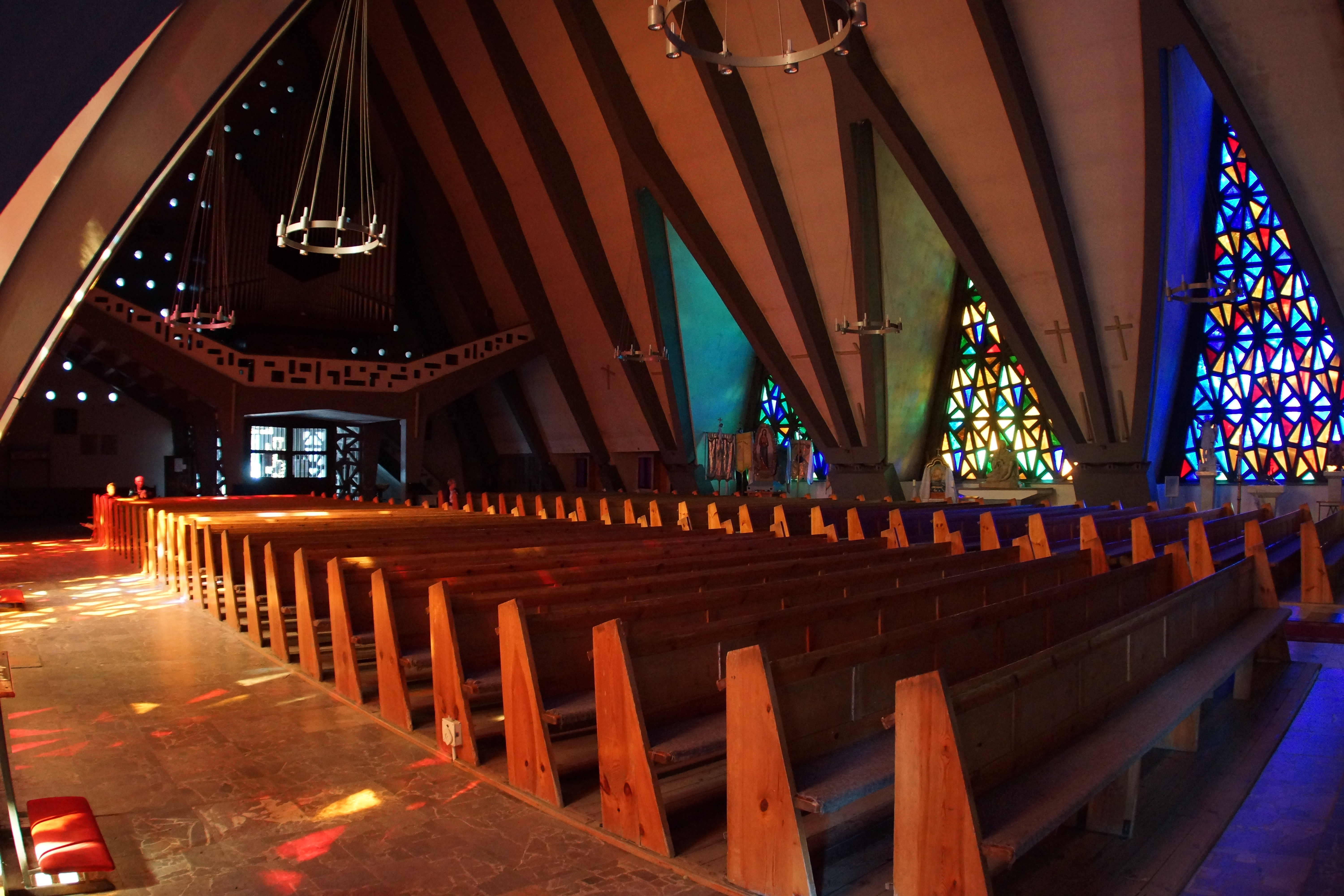 Władysławowo, kościół par. p.w. Wniebowzięcia NMP, 1932-1936, 1957-1961